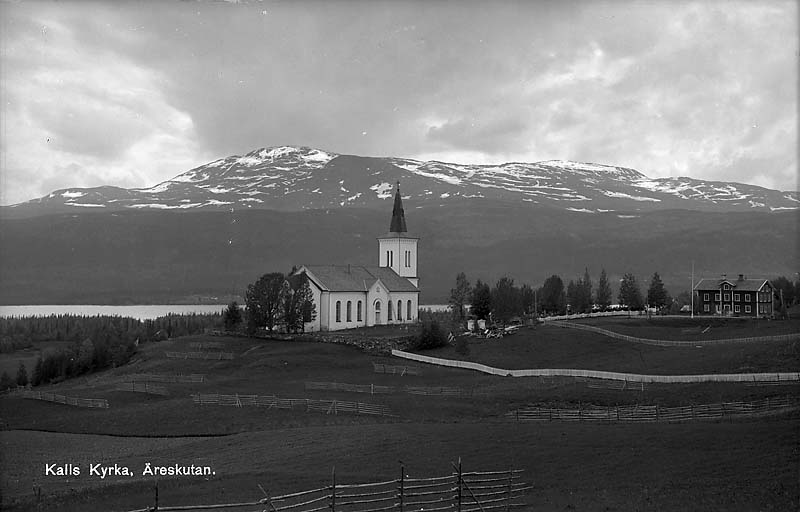 Kalls kyrka